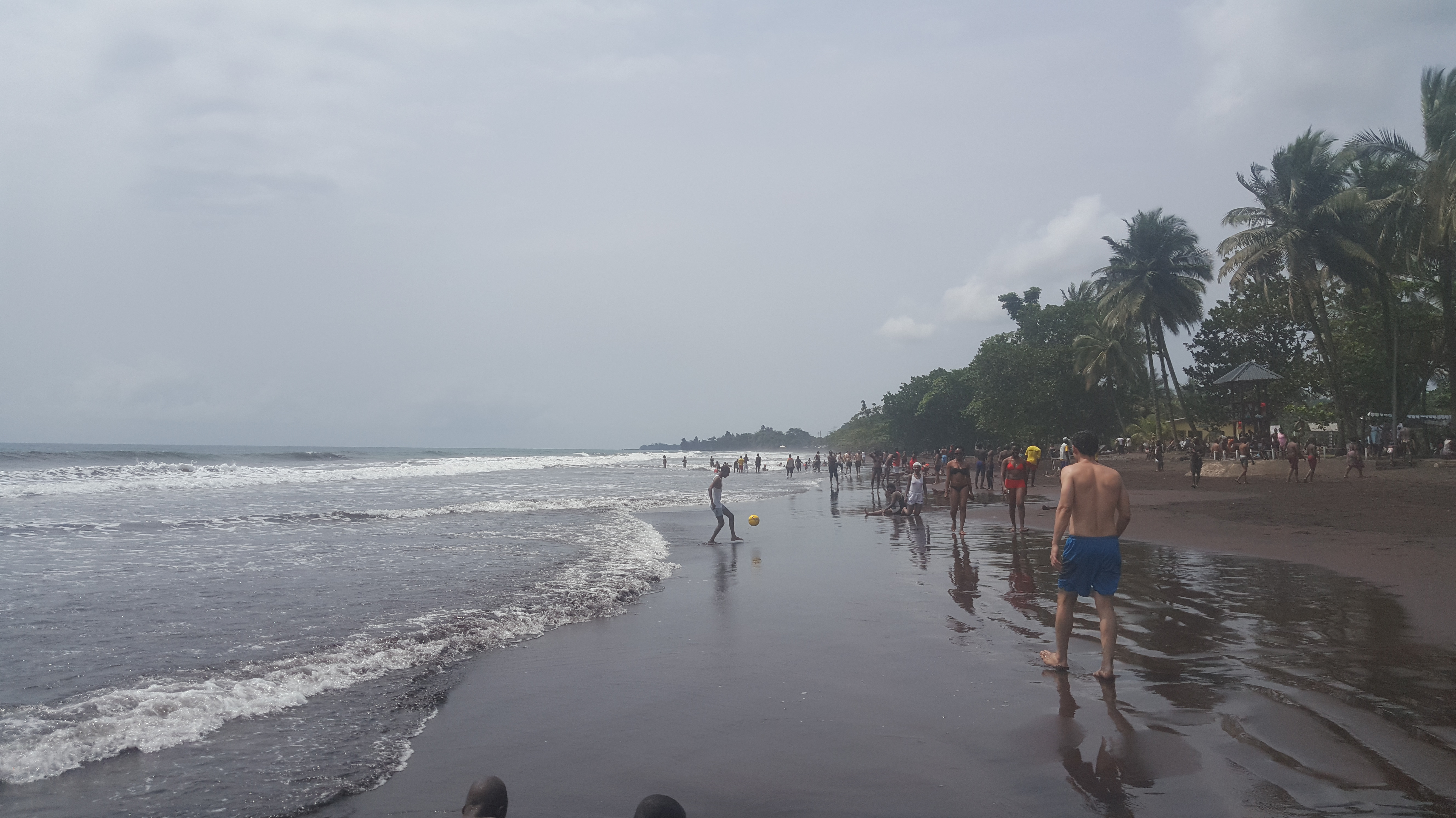 Mer horizon, Limbé, Sud-Ouest